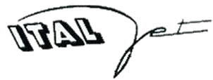 Altes Logo der Firma Italjet Moto